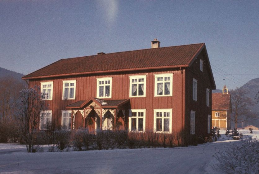 Sauherad prestegård. Foto: Ina Backer. Fra Riksantikvarens Kulturminnesøk.